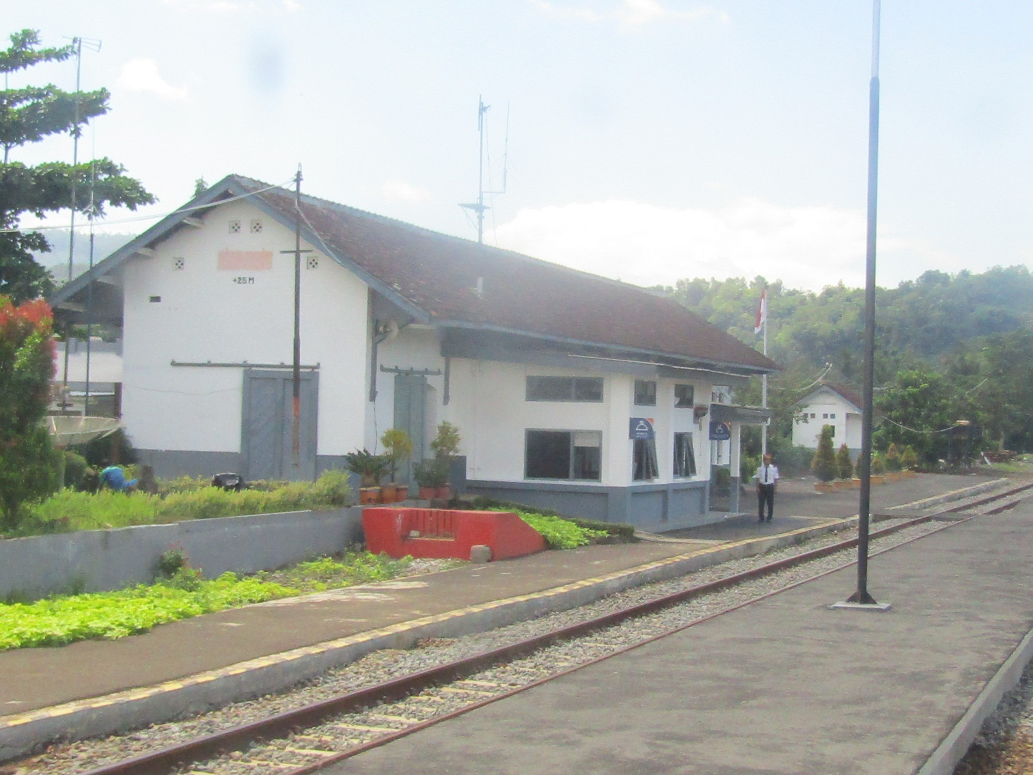 Tampak peron bangunan Stasiun Notog, 2019, dengan PPKA tunjuk-sebut Semboyan 1.